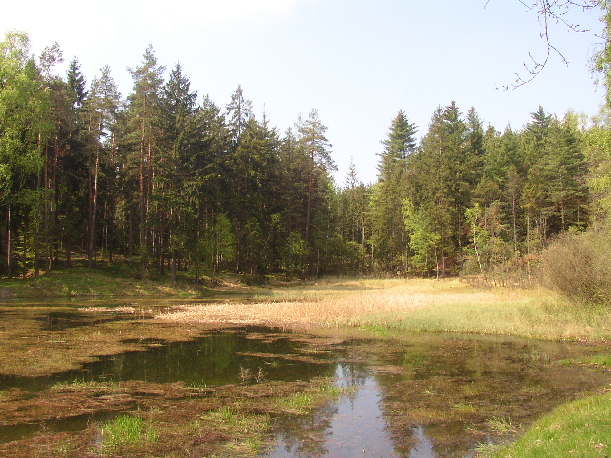 PP Noldenteich